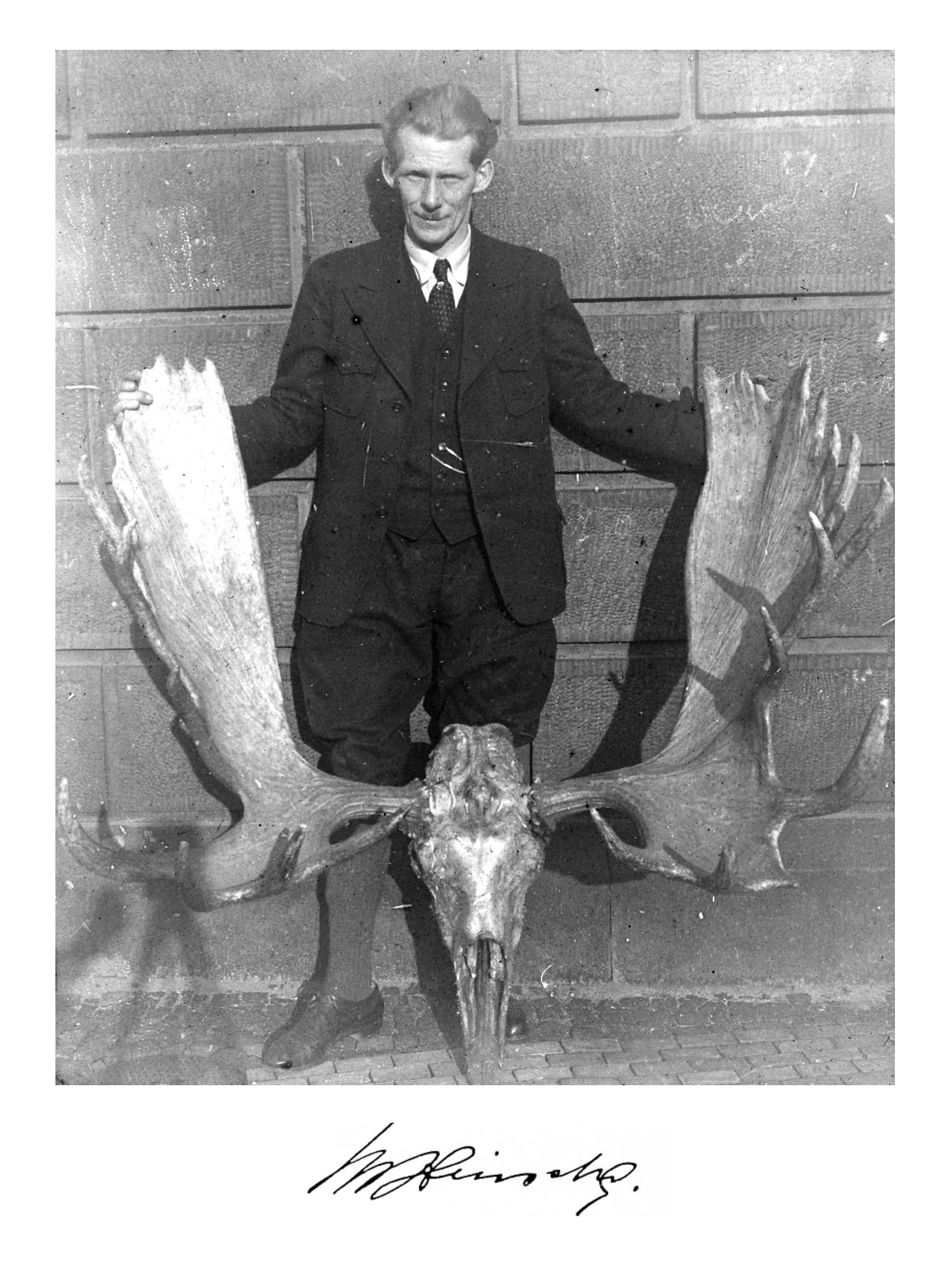 Hinsche Max mit Unterschrift